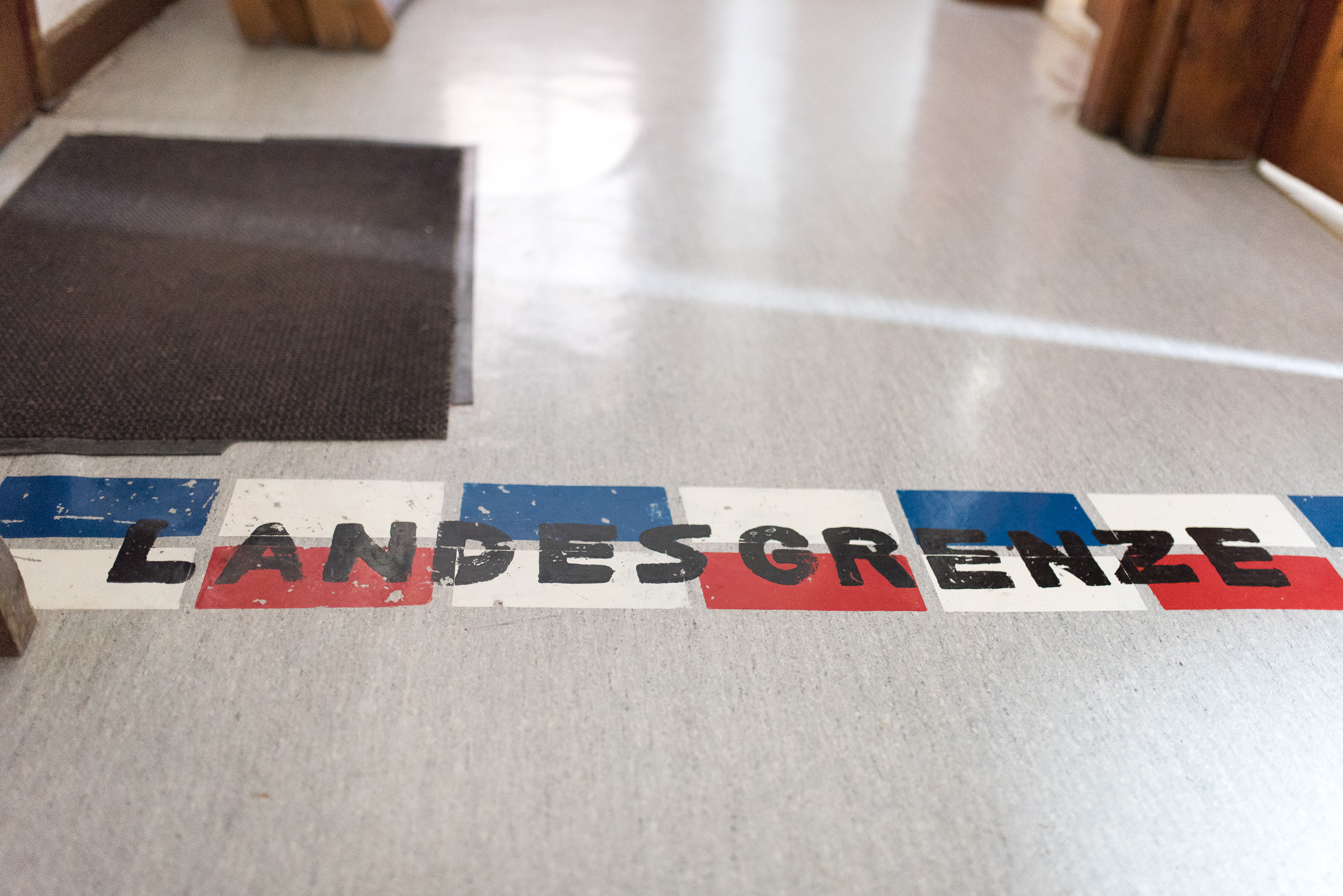 Grenzlinie zwischen Deutschland und Österreich innerhalb des Purtscheller Hauses